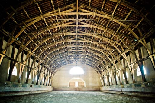 Grand Manege du Quartier Kilmaine à Tarascon